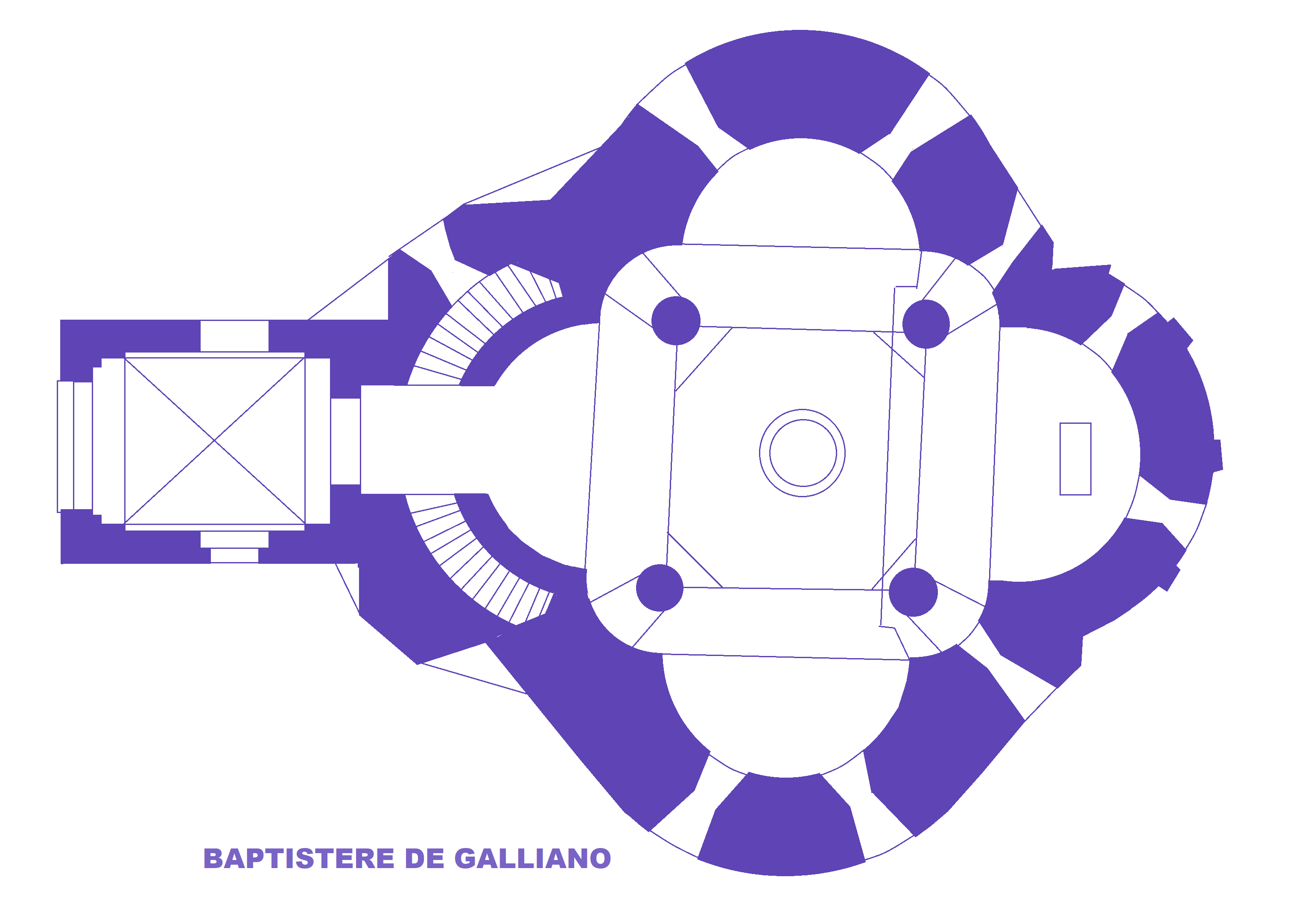 Baptistère de Galliano, Plan